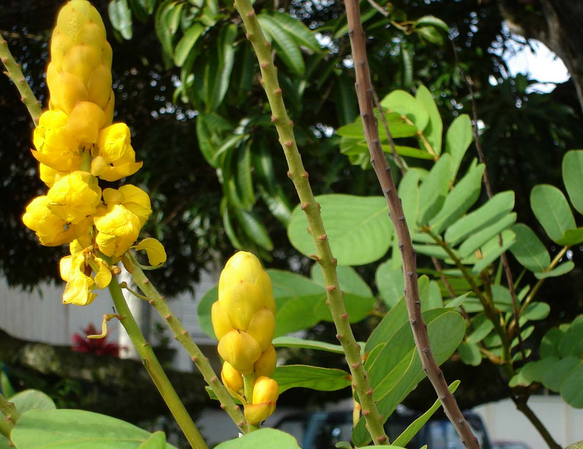 Senna alata; (teʻelango) an ornamental in a Tongan garden